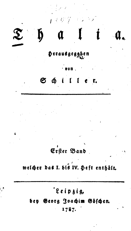 Thalia magazine, title